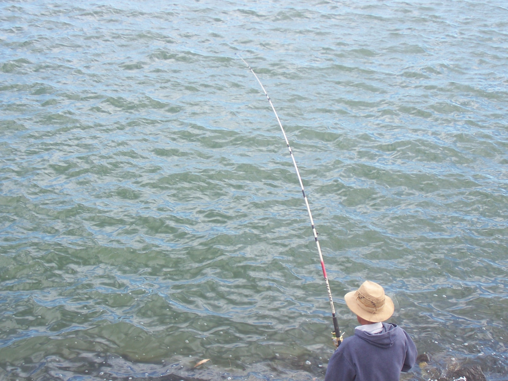 Pesca en el río Quequén Grande. En cercanías de la ciudad de Necochea.